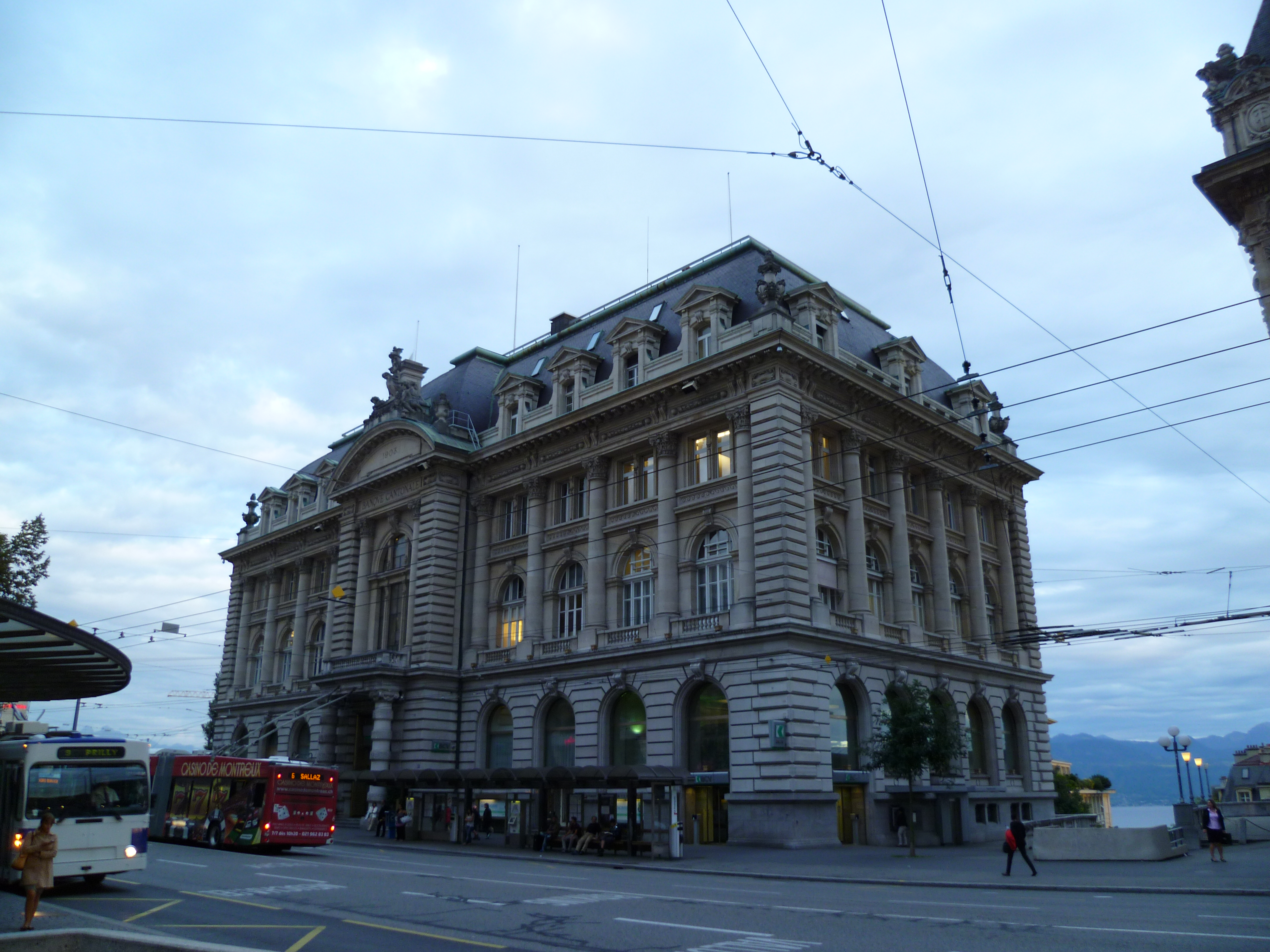 Archives de la Banque Vaudoise, Lausanne, Suisse